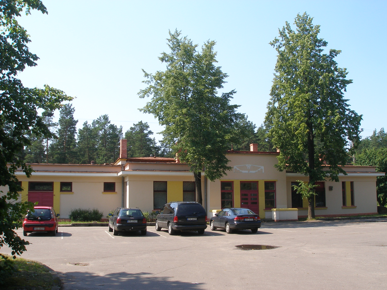 Priedaines stacijas ēka.